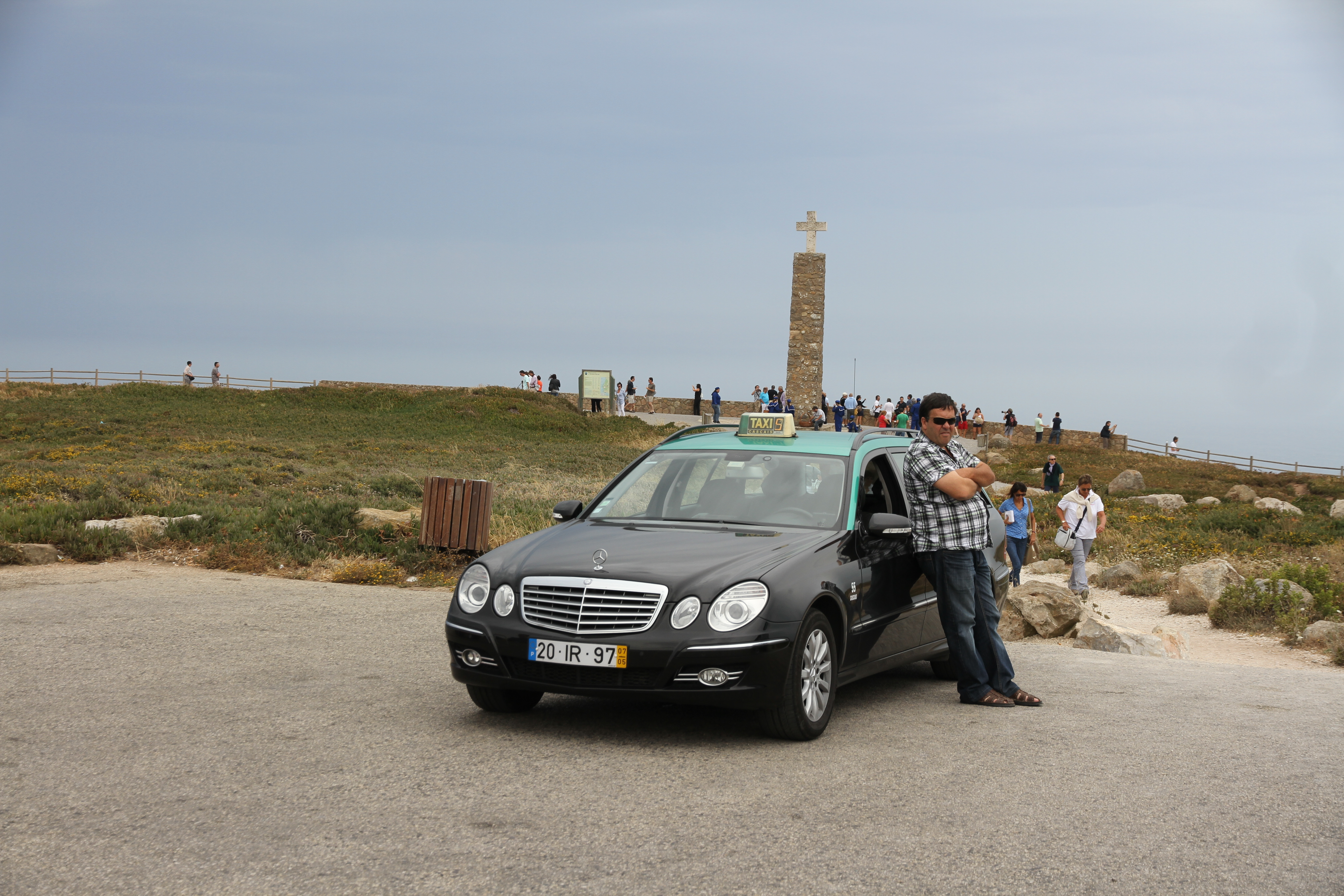 6.26.2011 - 7.3.2011 Lisbon travel